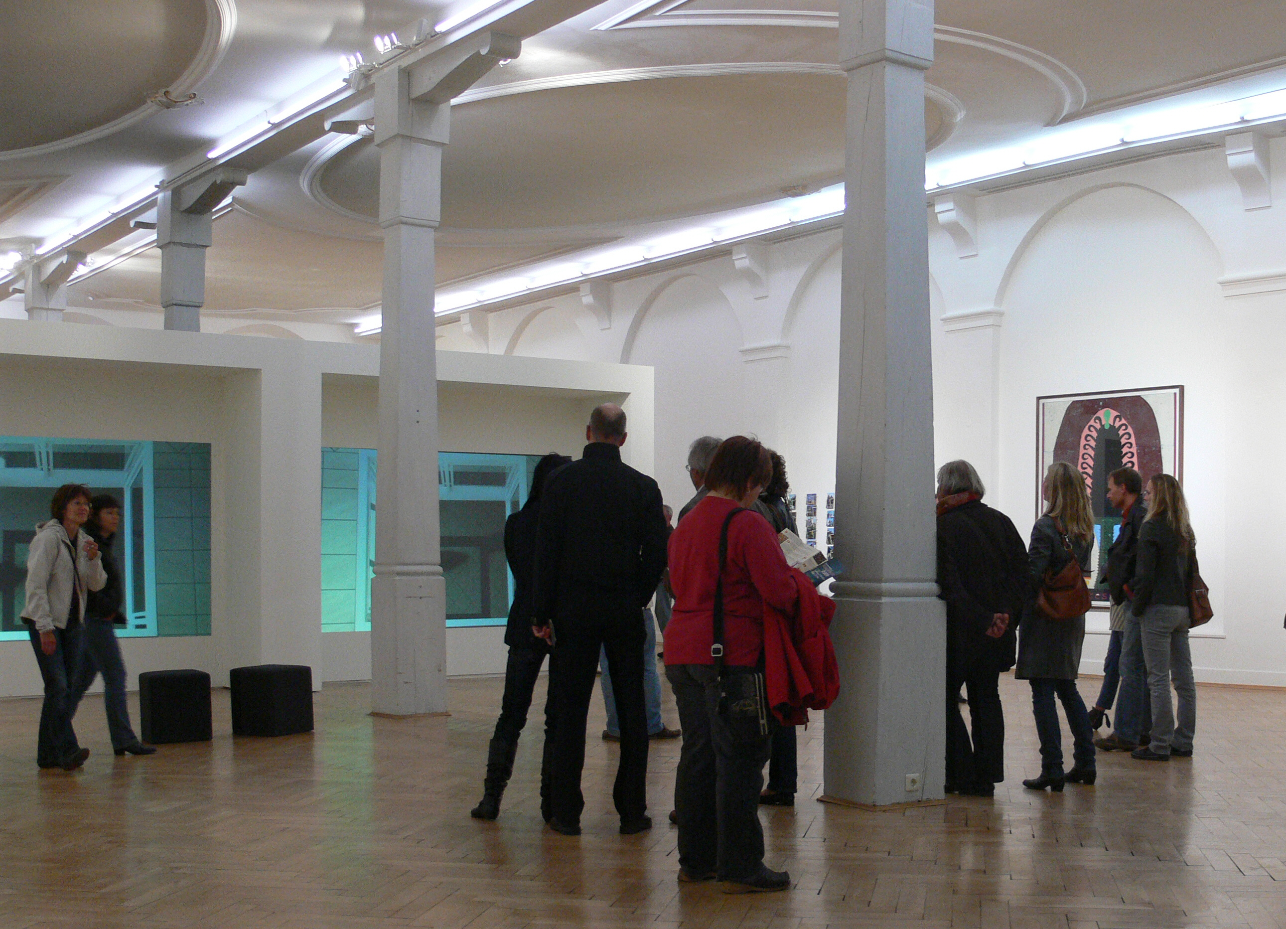 Altes Theater Ravensburg, Städtische Galerie im Obergeschoss (ehem. Theatersaal)